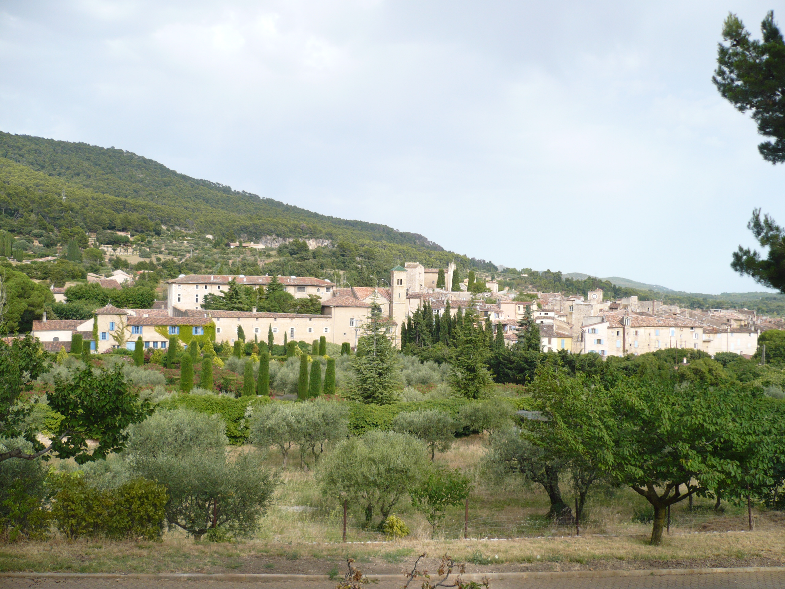 Vue du village d'Aups